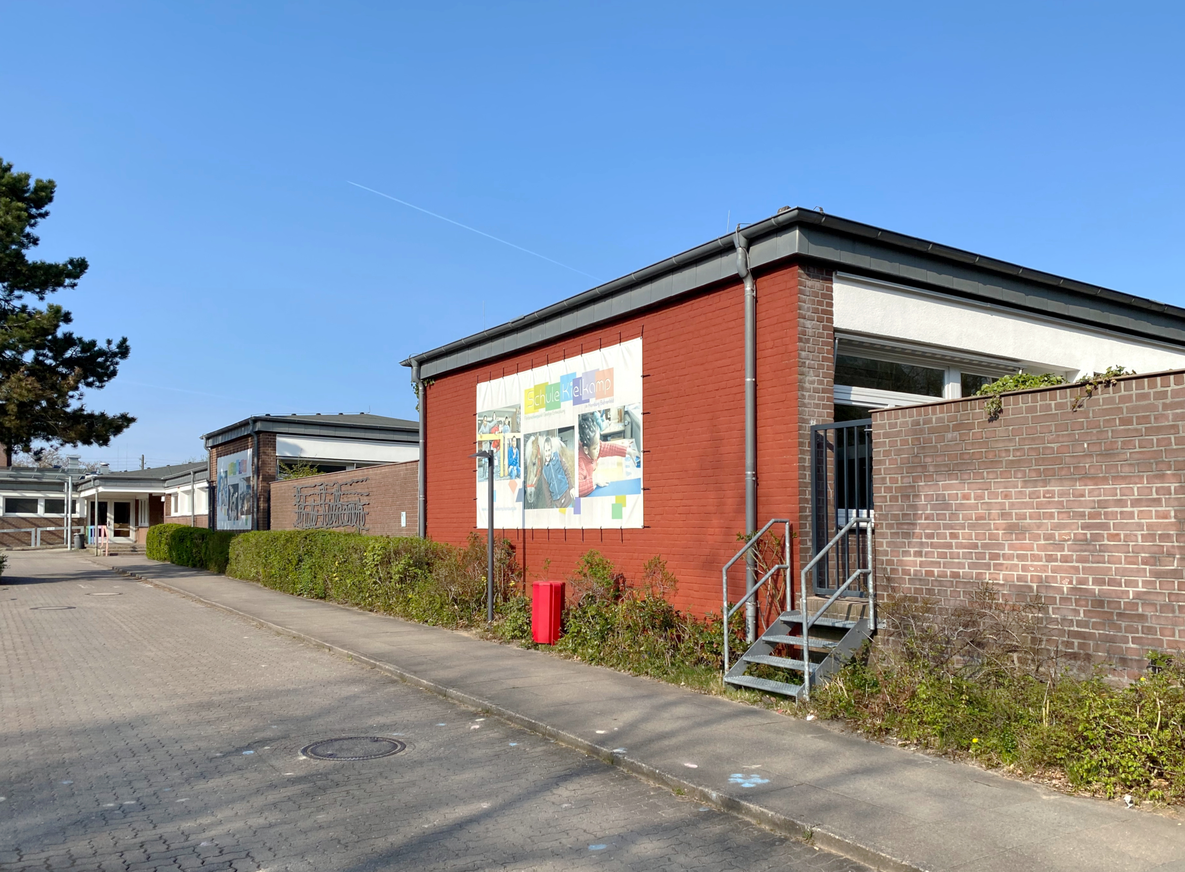 Schule Kielkamp in Hamburg-Bahrenfeld, Schulgebäude mit Wandbild